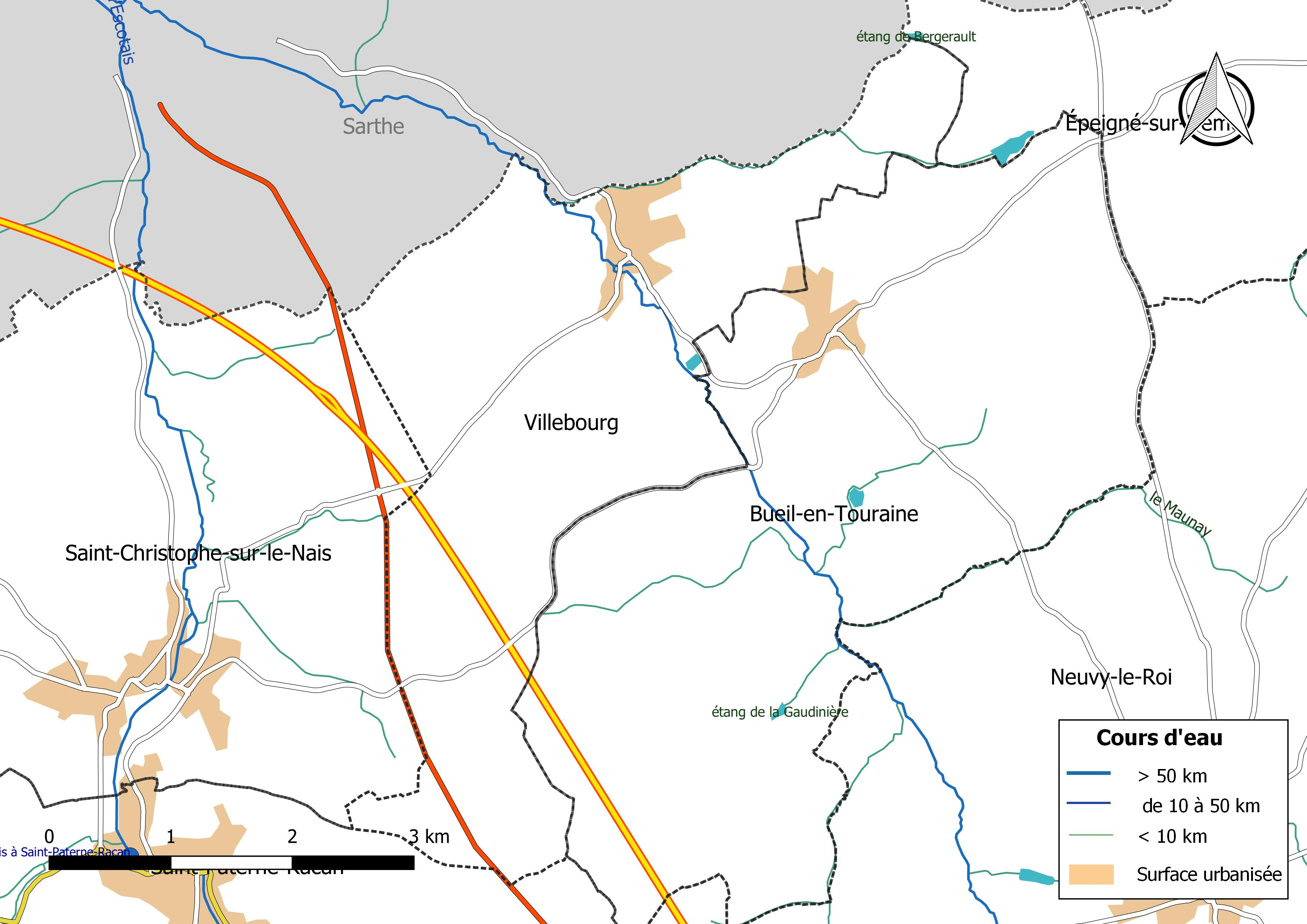 Carte du réseau hydrographique de la commune de Villebourg (France).